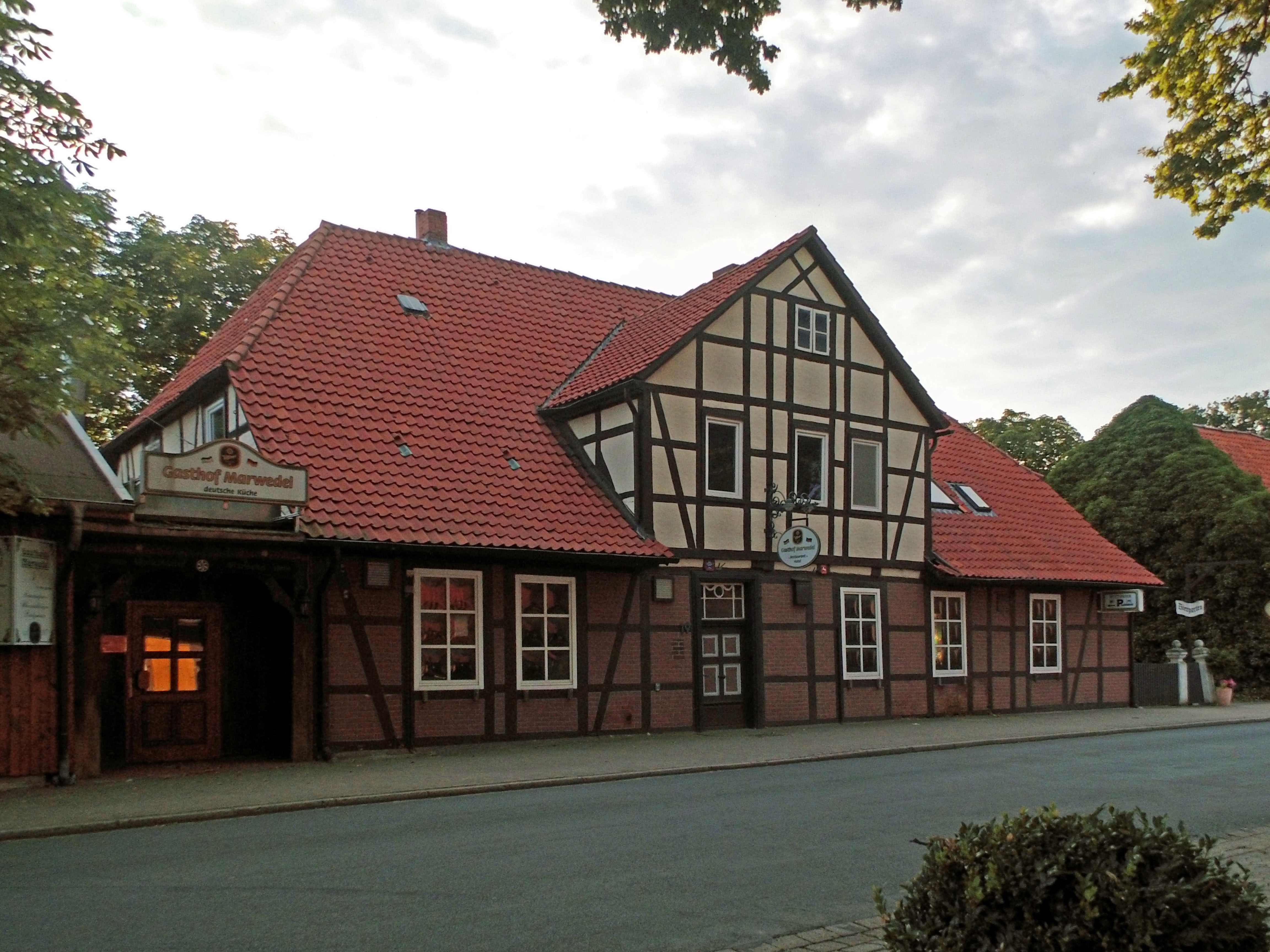 Dorfgasthof in Neubokel bei Gifhorn.